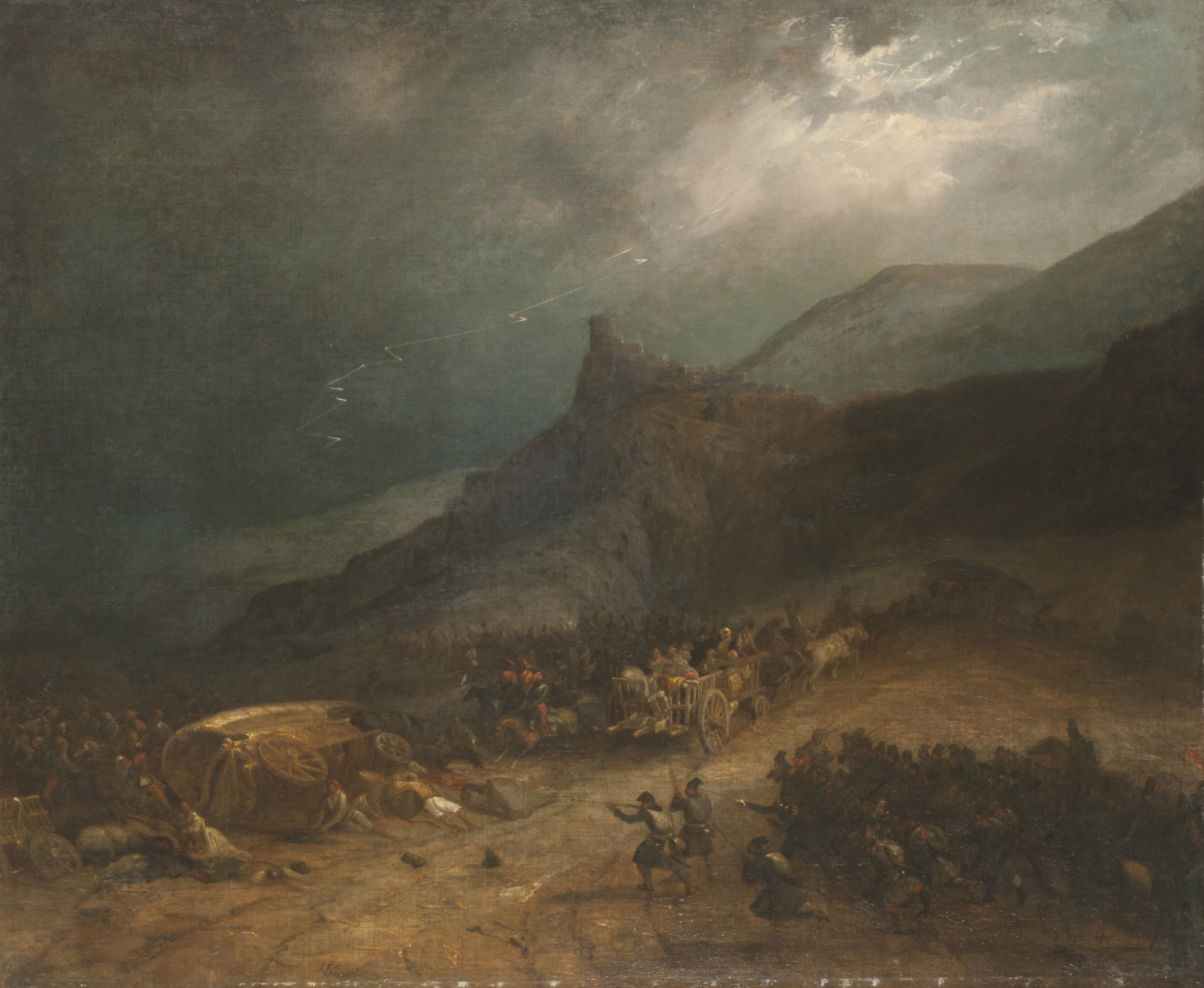 Jenaro Pérez Villaamil, Ataque a un convoy carlista (La batalla de Arlabán). 1838. 84 x 101 cm, con marco: 102 x 120 cm, óleo sobre tela. Inv. 2787.